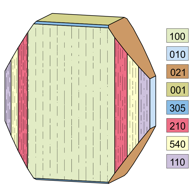 Kristallzeichnung eines Carbocernait-Kristalls unter Zugrundelegung einer Vorlage von Andrej G. Bulakh, W. W. Kondratjewa und E. N. Baranova (1966): „КАРБОЦЕРНАИТ – НОВЫЙ РЕДКОЗЕМЕЛЪНЫЙ КАРБОНАТ (Carbocernaite, a new rare earth carbonate)“. - Zapiski Vsesoyuznogo Mineralogicheskogo Obshchestva 90 (1), Seite 44.